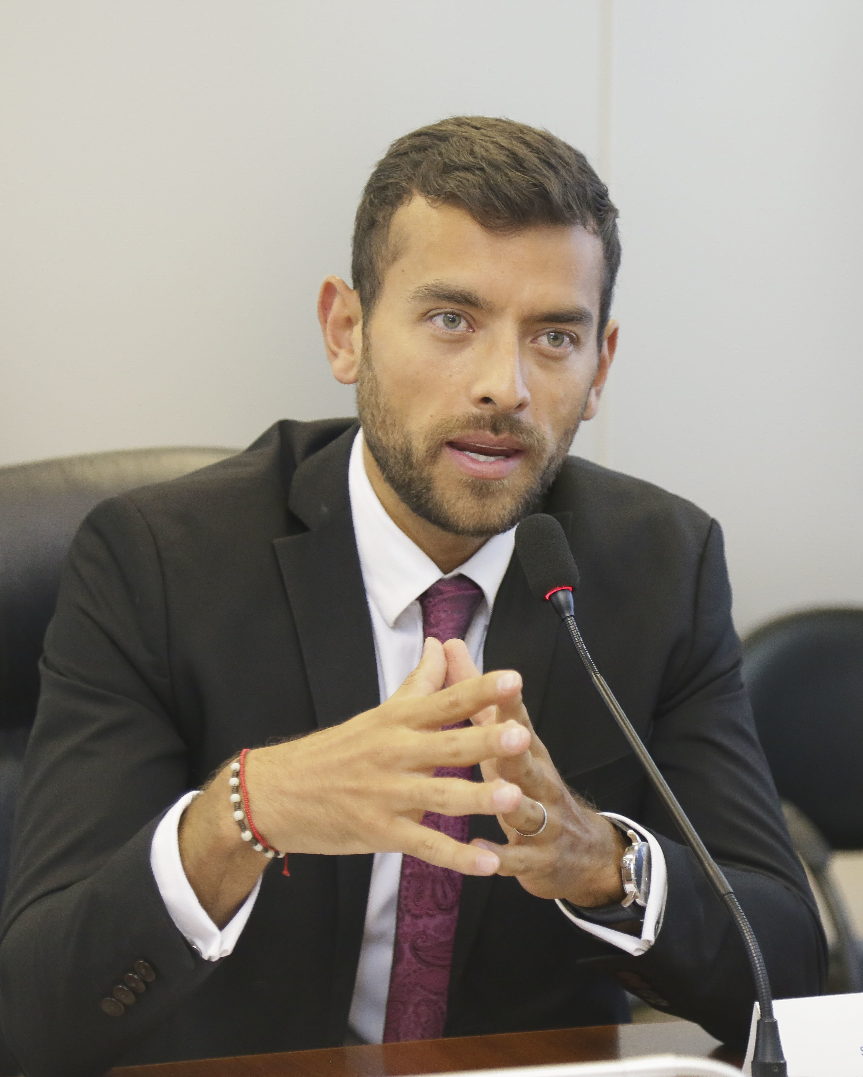 Año 2018